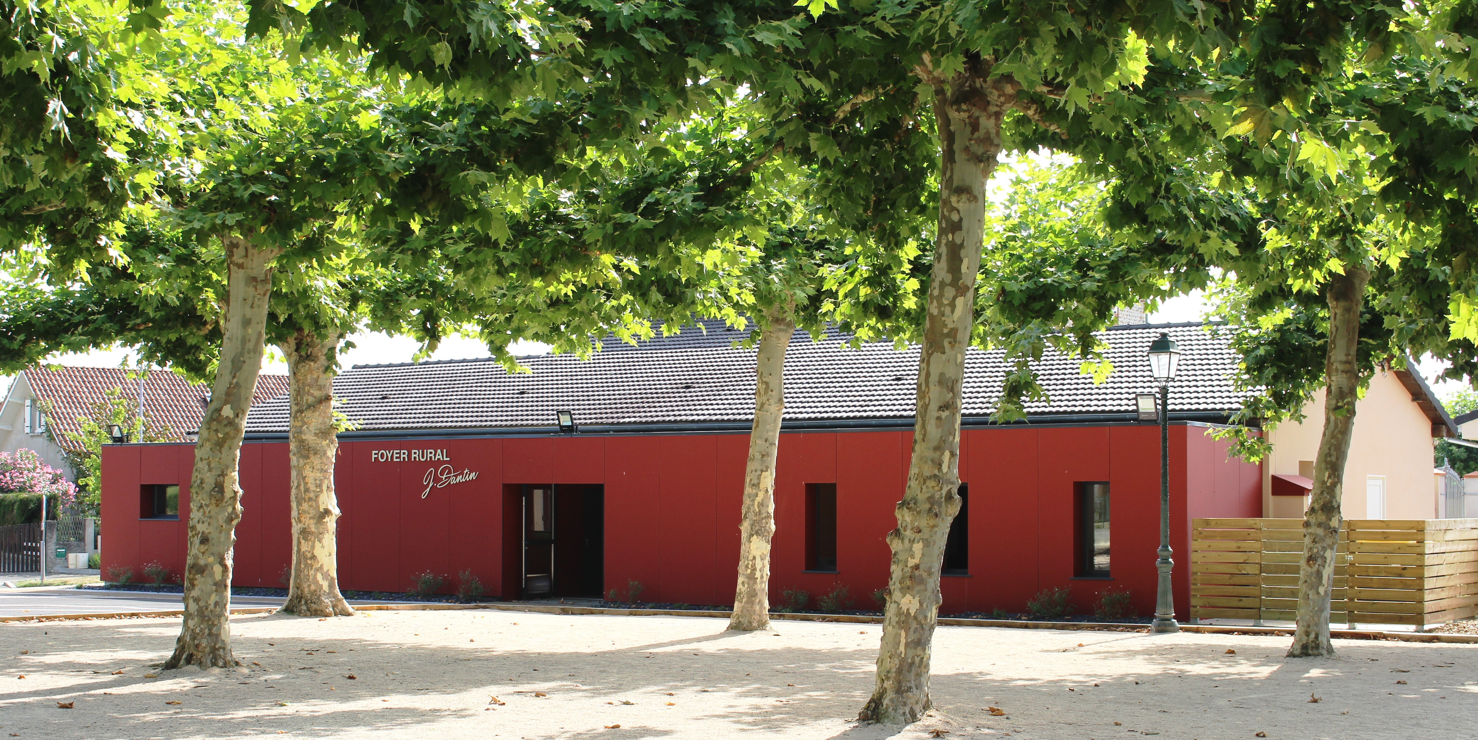 Foyer rural de Lagarde (Hautes-Pyrénées)